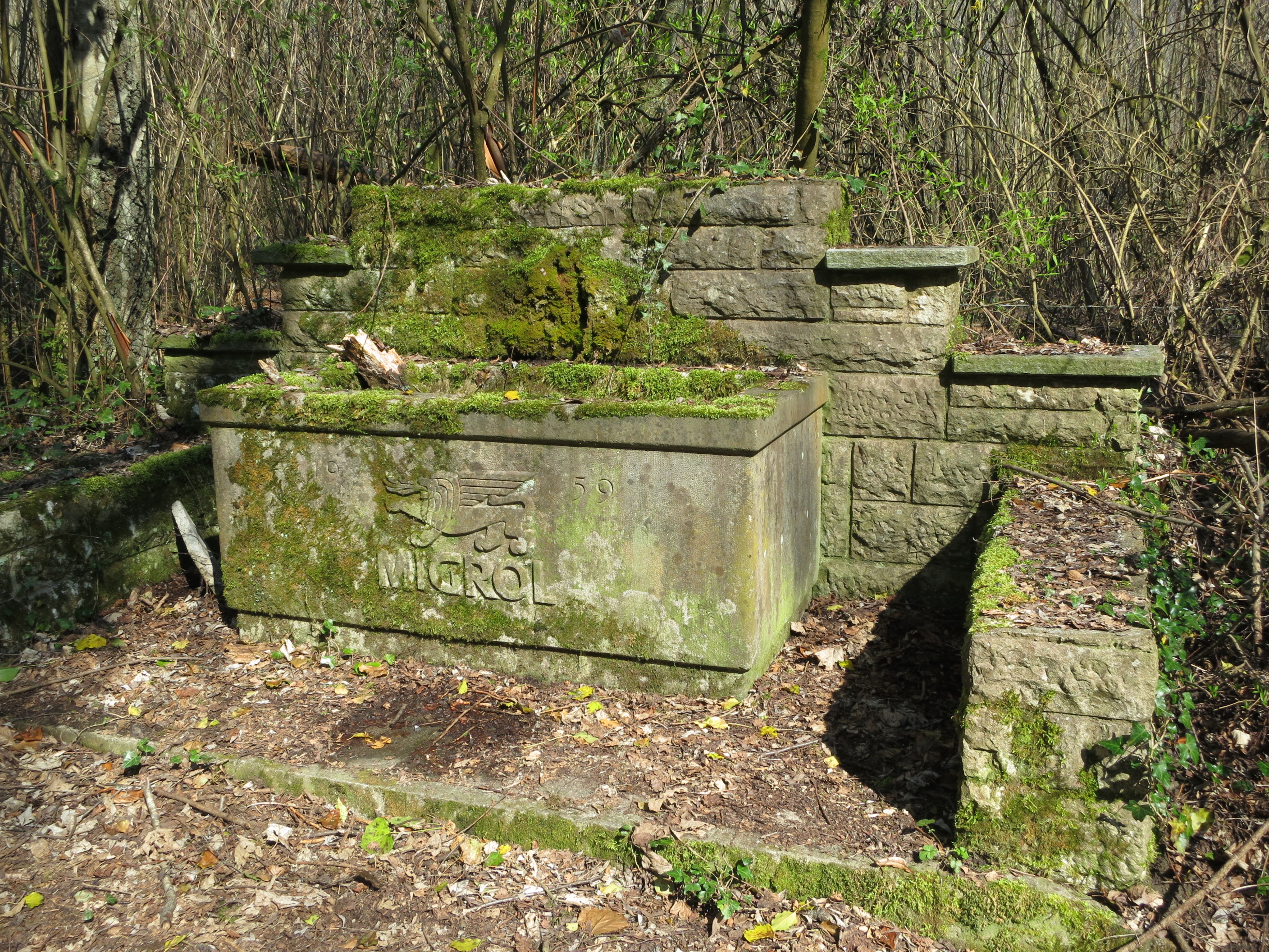 Tanklager Migrol Tössriederen, Eglisau ZH, Schweiz, 1959